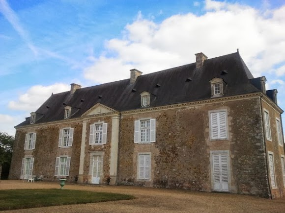 Château du Puy (InscritInscrit) .